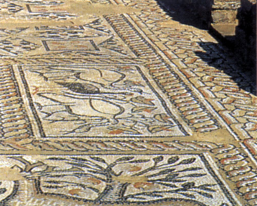 Мозаик од Октиси каде што се наоѓа ранохристијанска базилика од крајот на V и почеток на VI век. Подниот мозаик на базиликата е богато украсен со претстави на елени, коњи, флора и геометриски орнаменти.